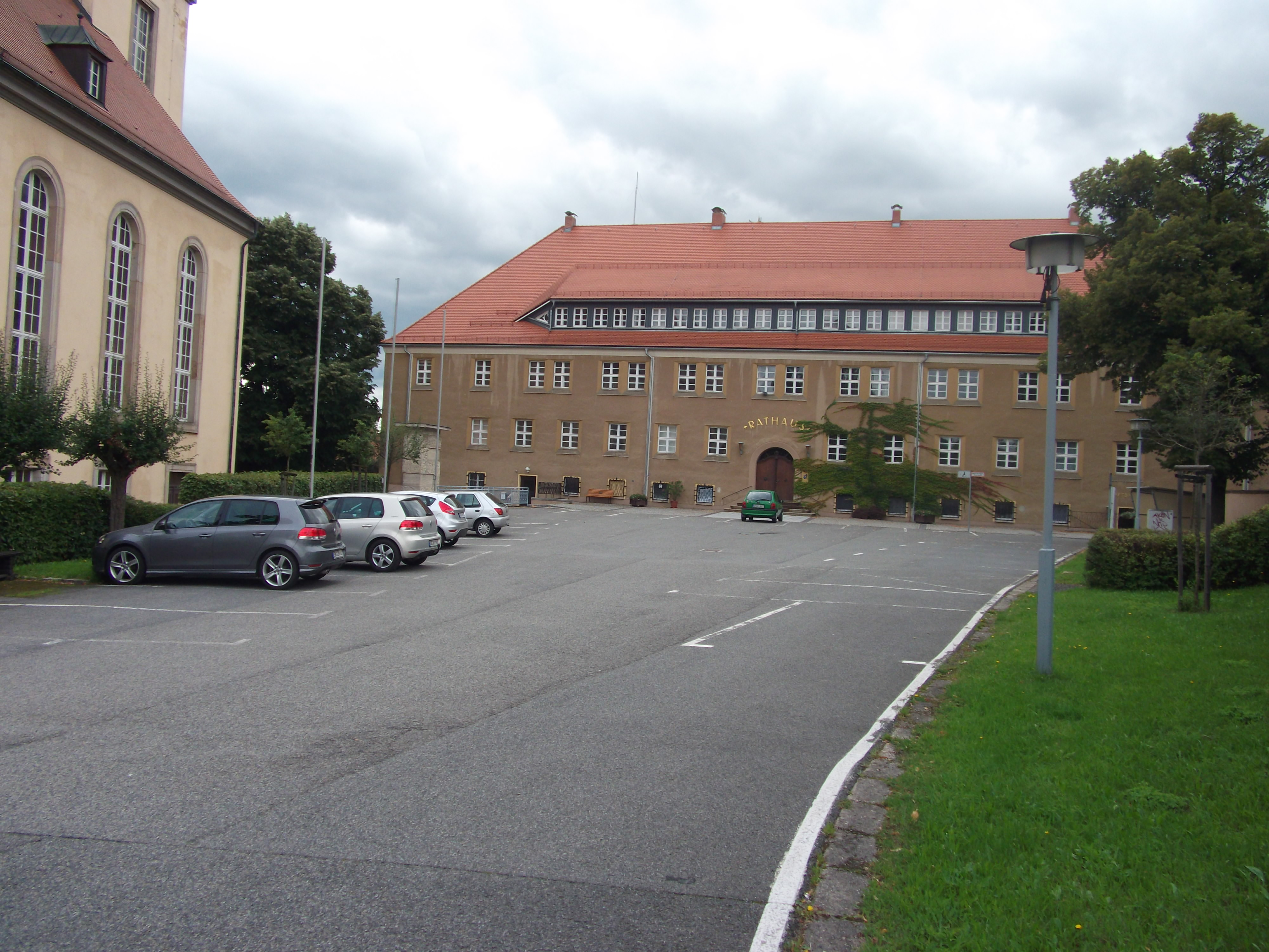 Rathaus Seifhennersdorf - Sitz der Stadtverwaltung